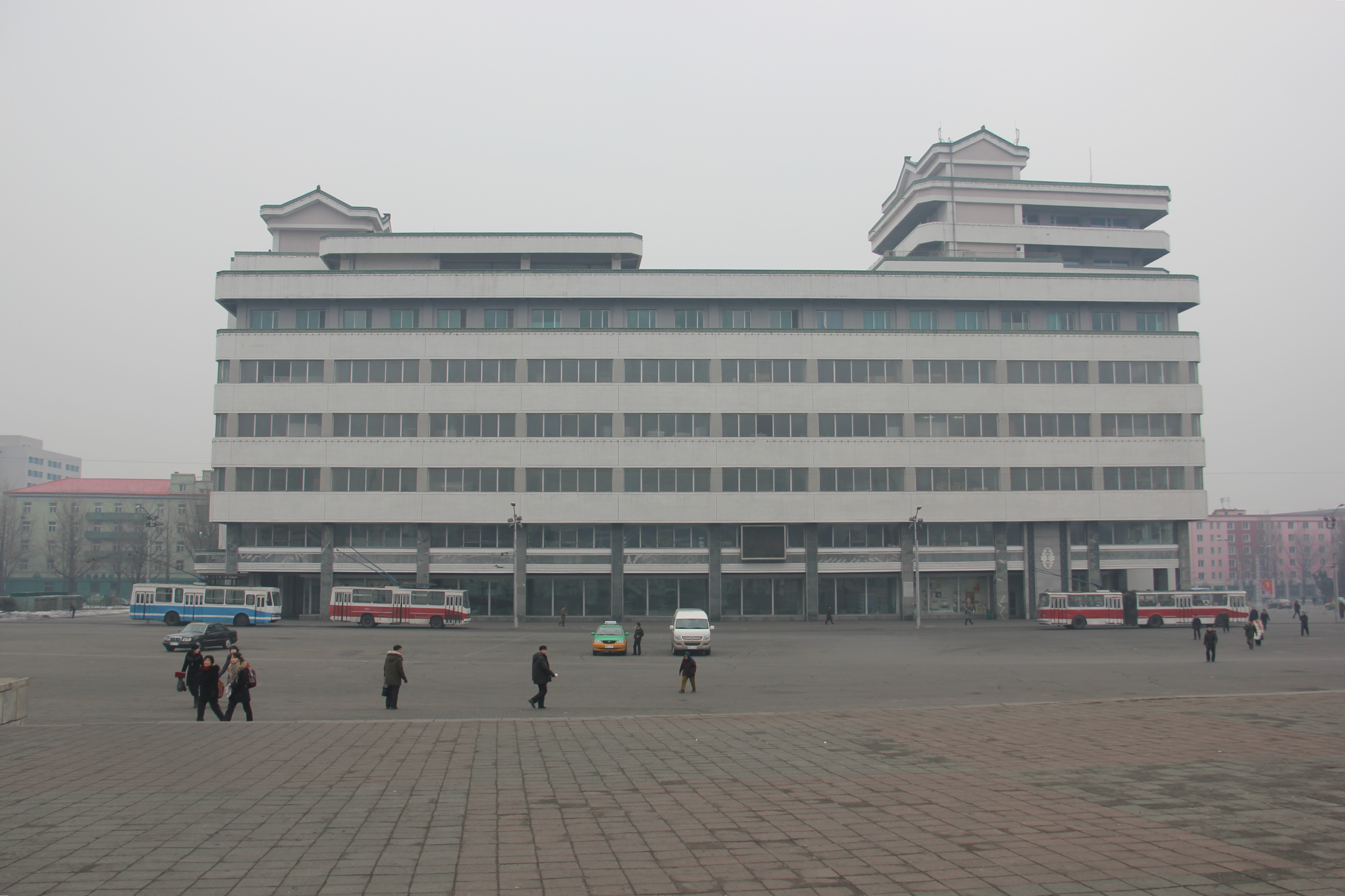 Pyongyang Department Store No. 1